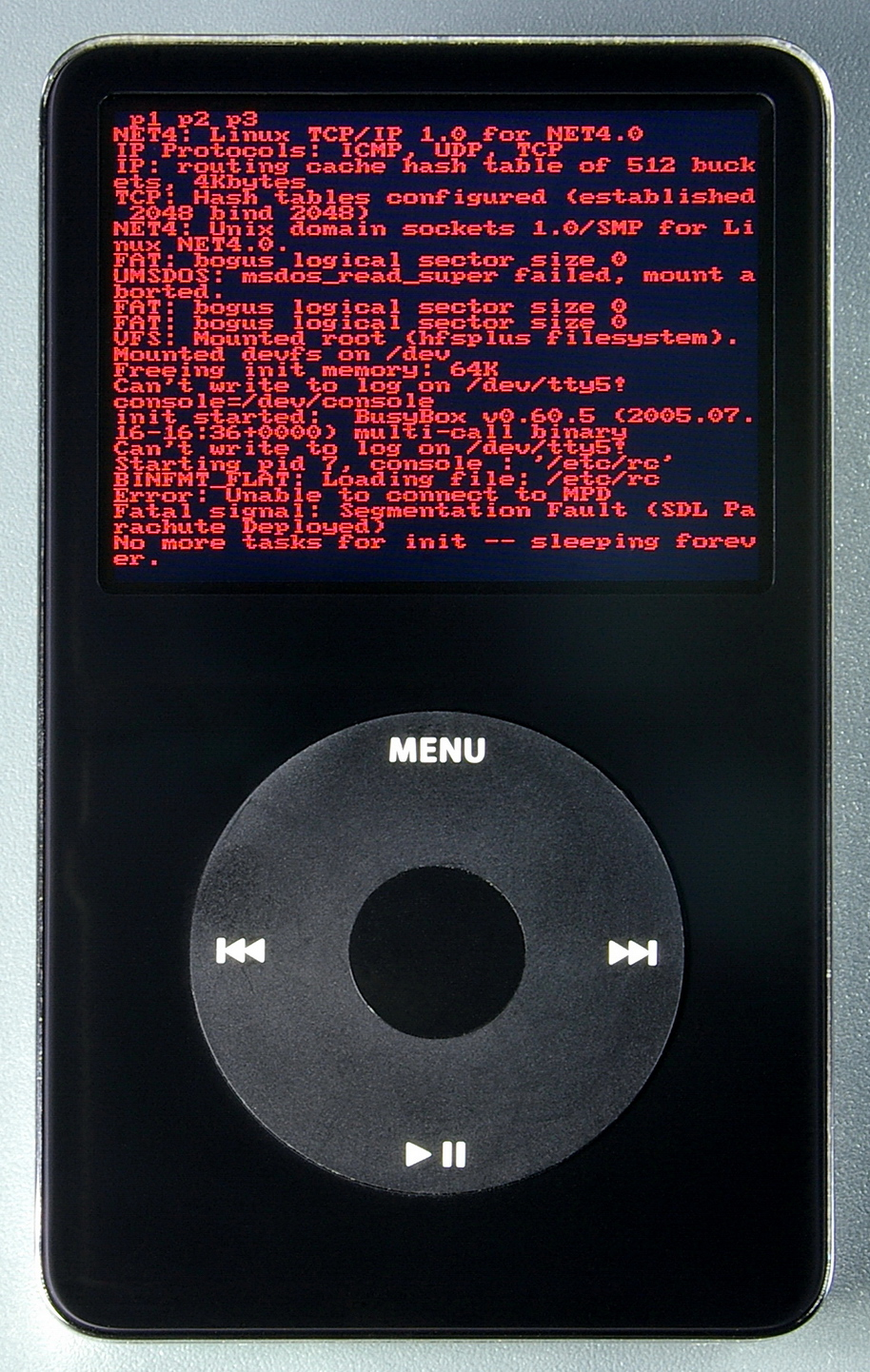 iPod der Firma Apple mit Betriebssystem Linux, Bildschirm mit dmesg